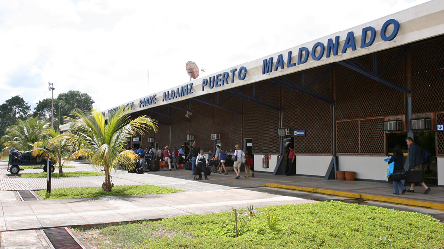 Puerto Maldonado, airport